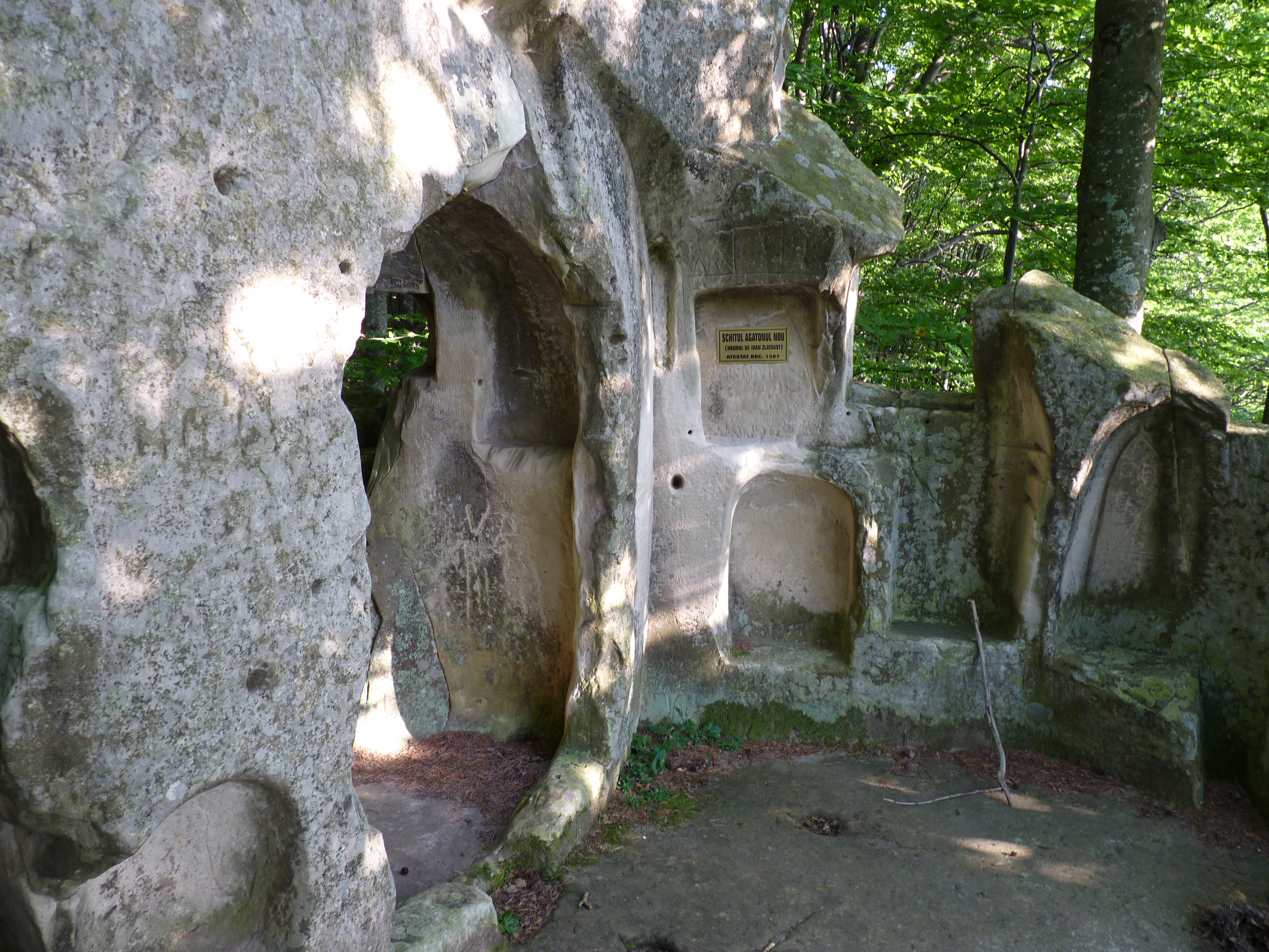 Schitul Agatonul Nou